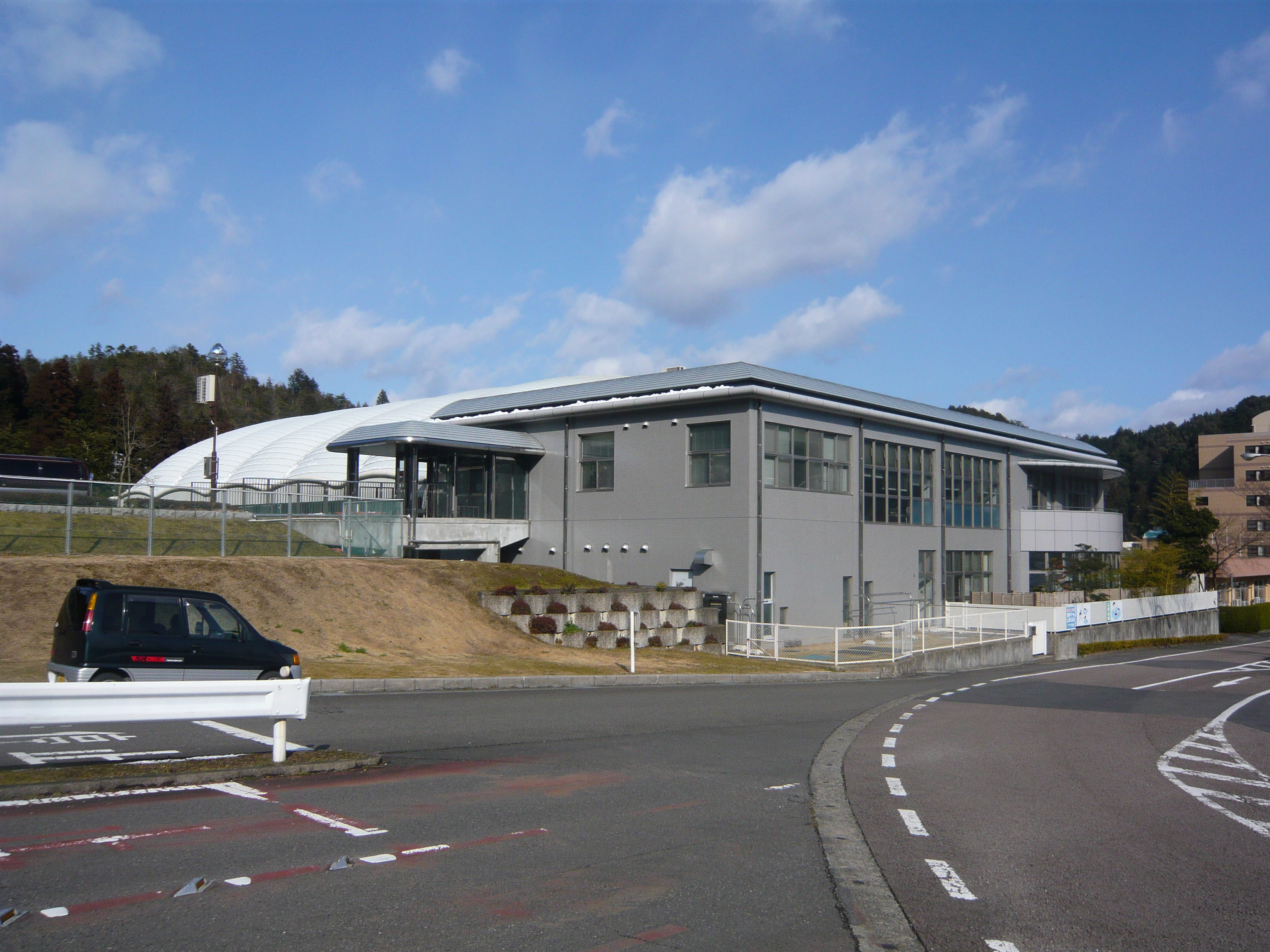 Plaza Kakebora（プラザ掛洞）,Gifu,Gifu,Japan（岐阜県岐阜市）で撮影。